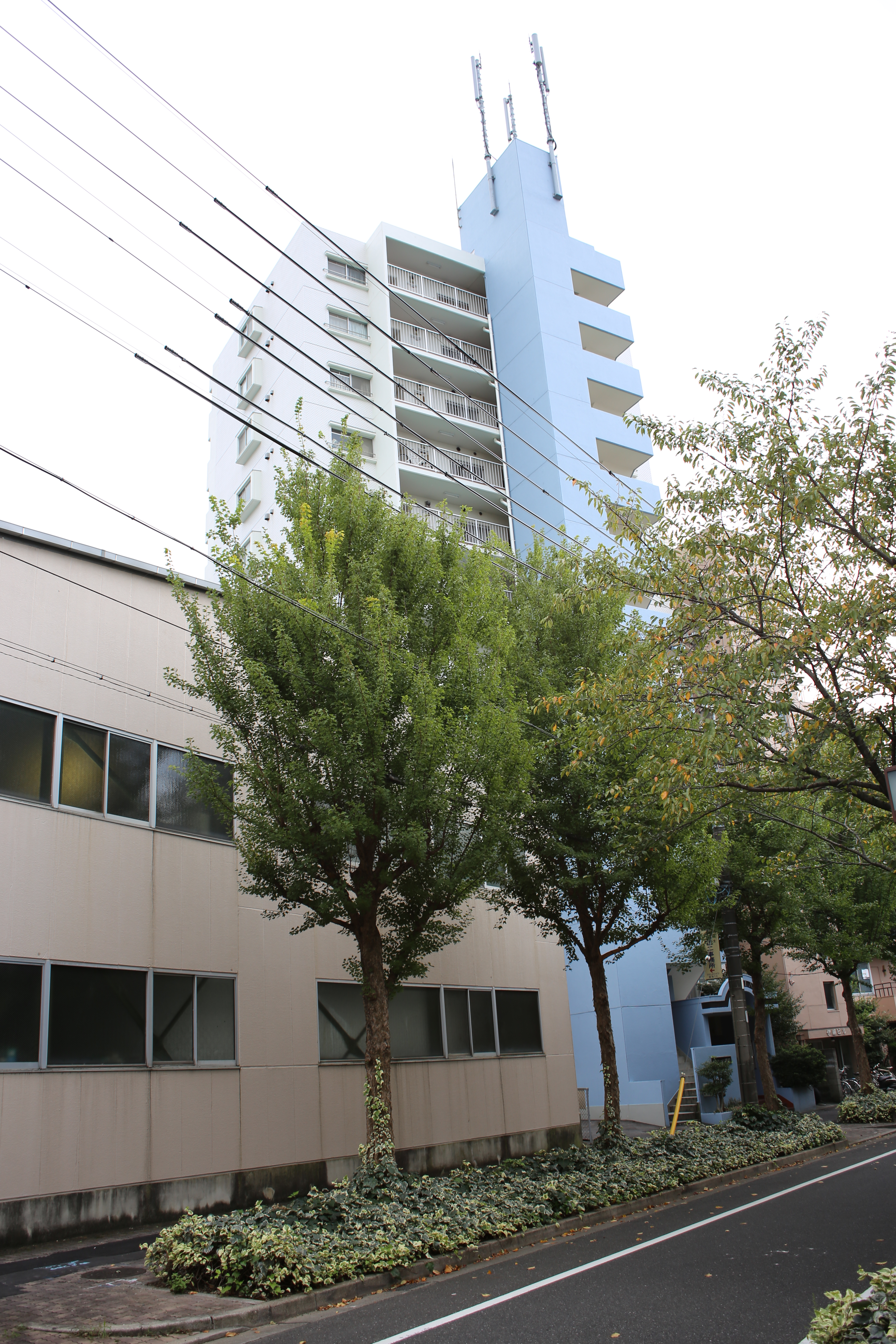 名古屋市東区東大曽根町のグランドハイツ琥珀を北側公道東側より撮影